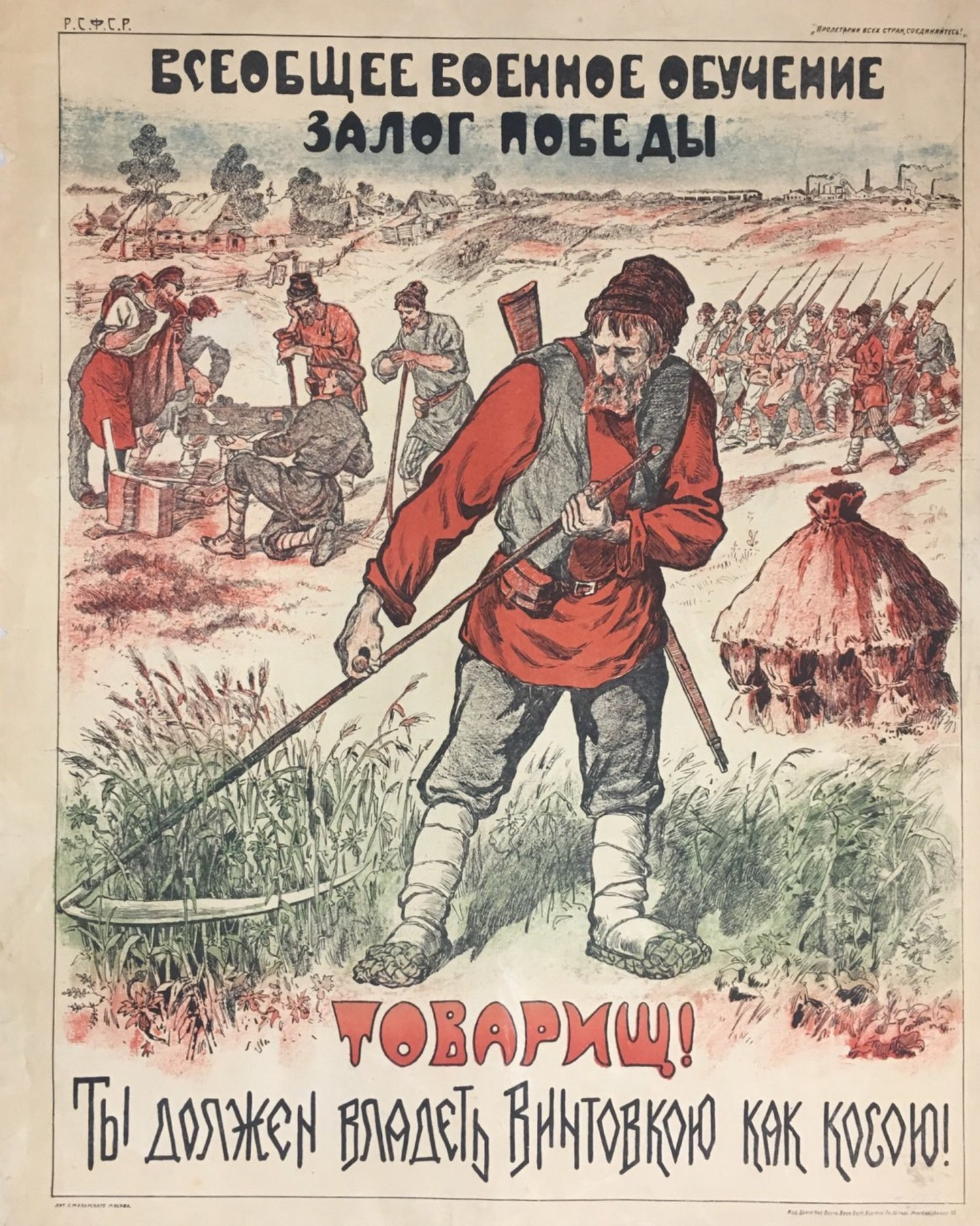 1919. Всеобщее военной обучение - залог победы! Товарищ! Ты должен владеть винтовкою как косою!.jpg